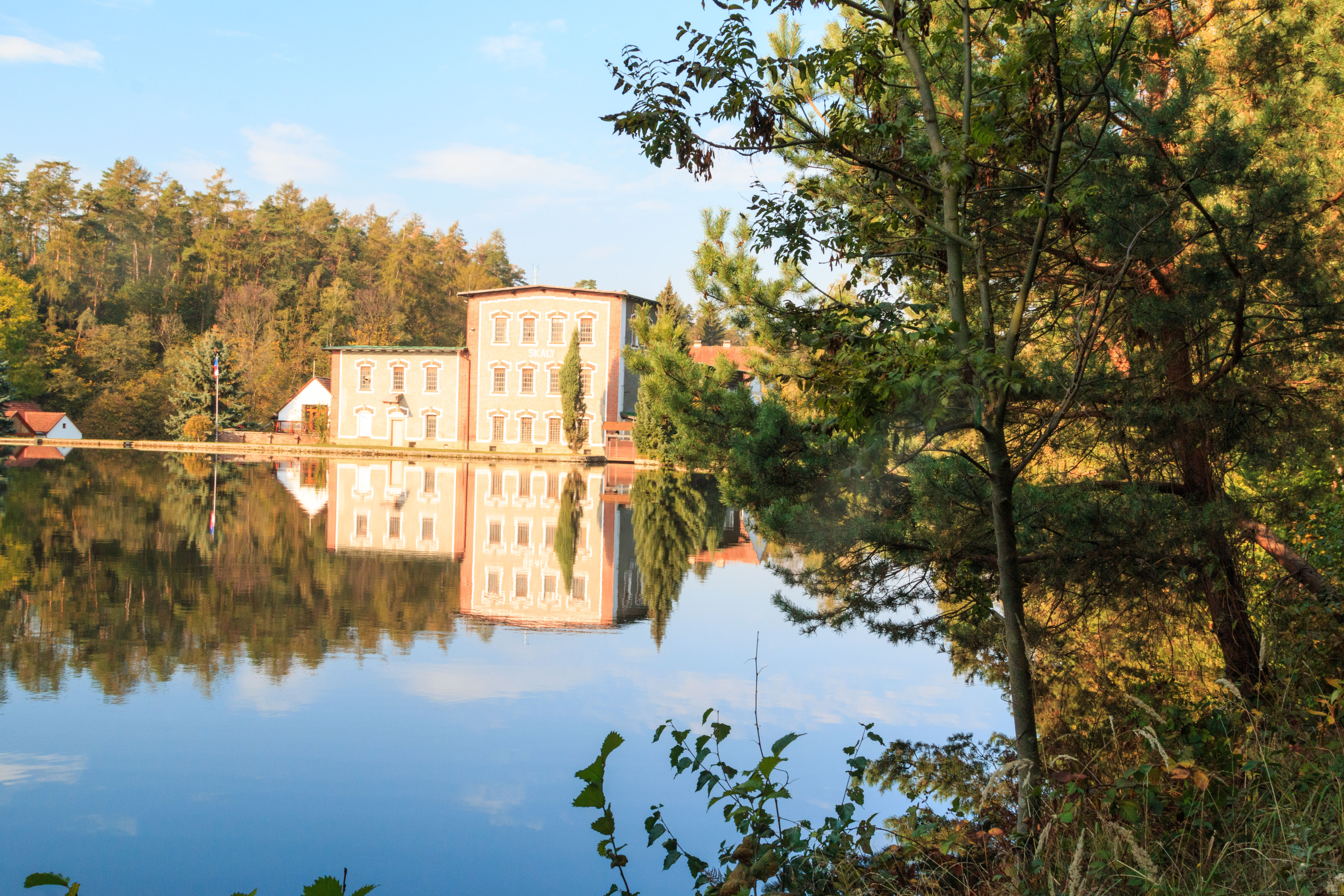 Rybník nad mlýnem Skály u Škrovádu Project: Vodstvo. Ticket: 1618.